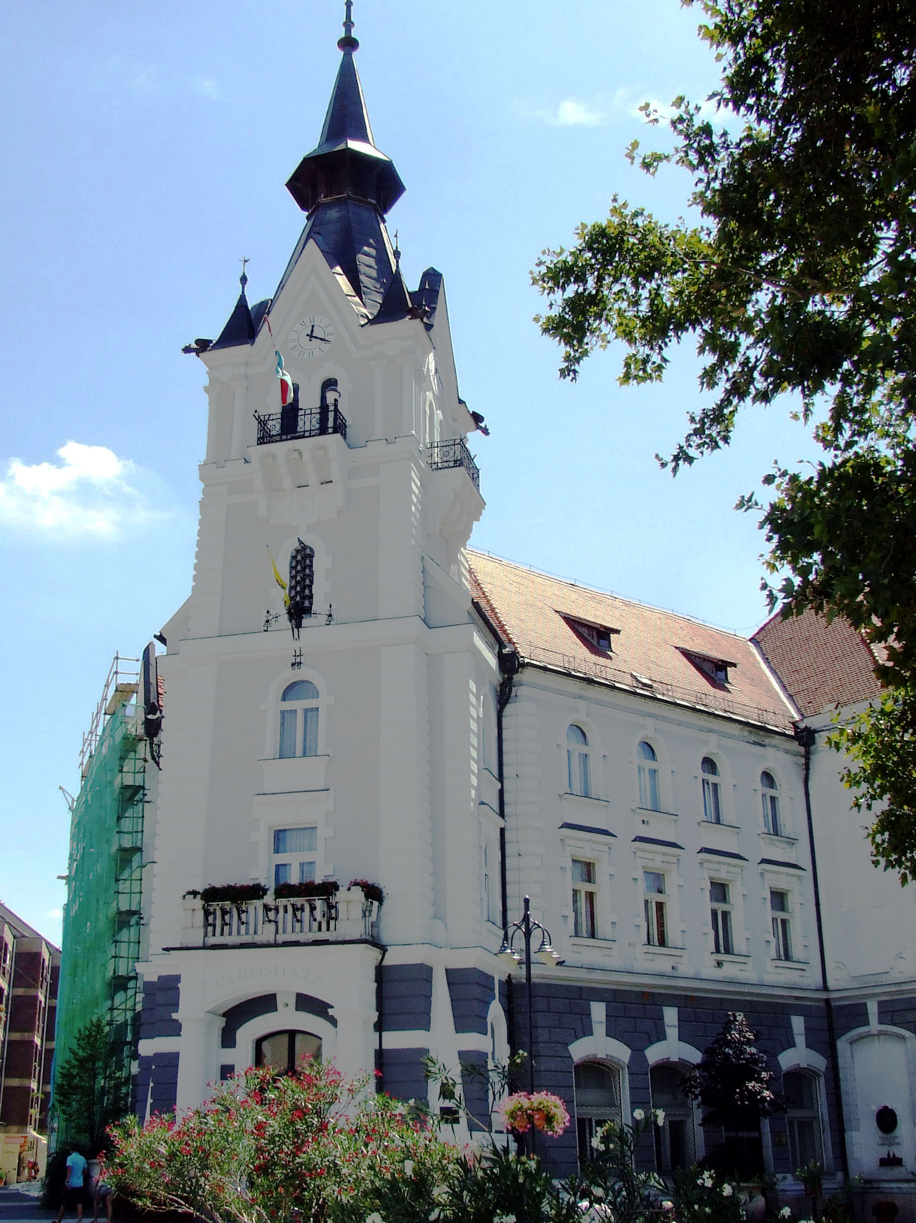 A kaposvári városháza. Épült Kopeczek György és Kertész Róbert tervei alapján 1902 és 1904 között